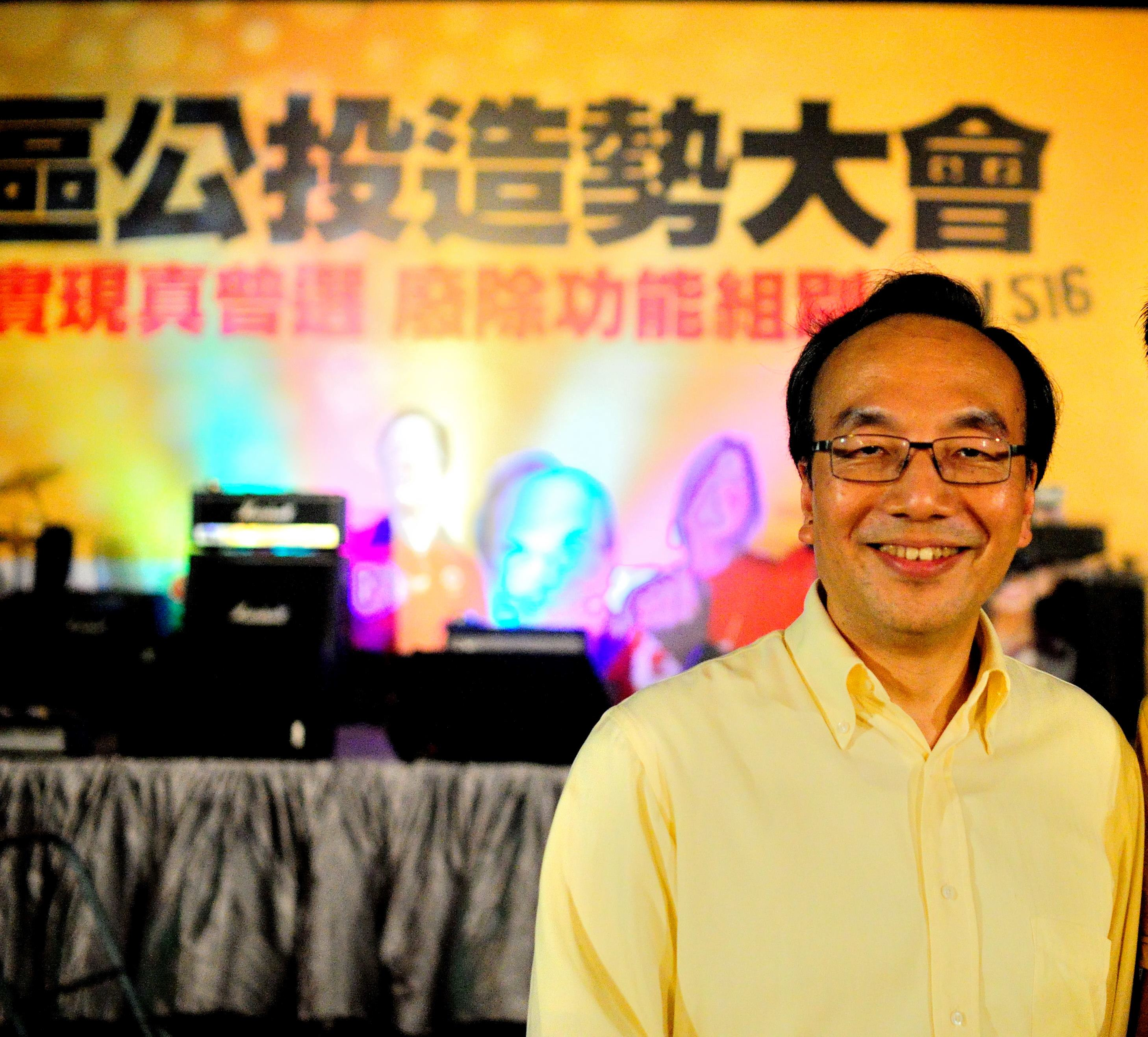 中文（香港）